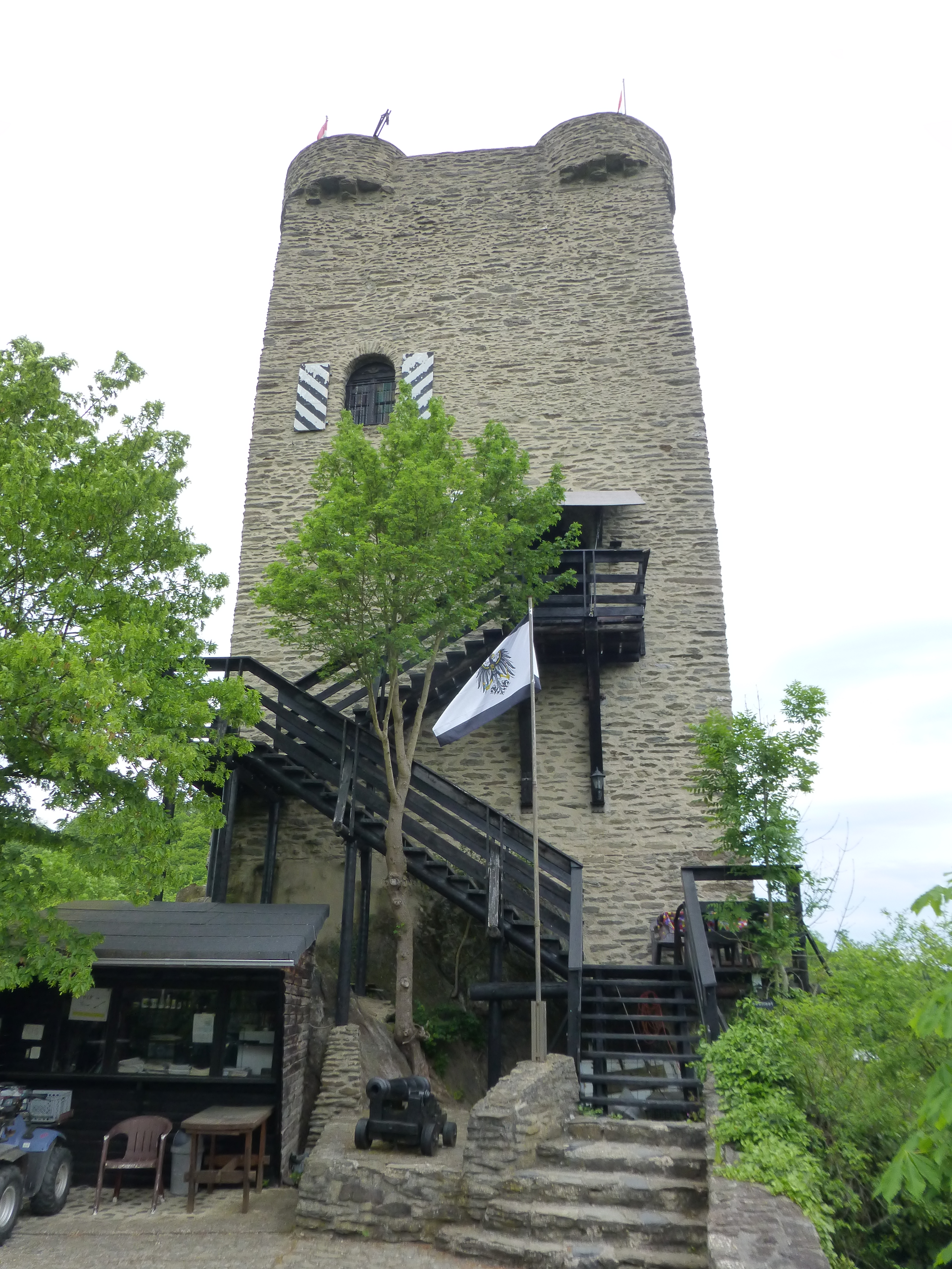 Burg Laurenburg; Westseite mit Außentreppe